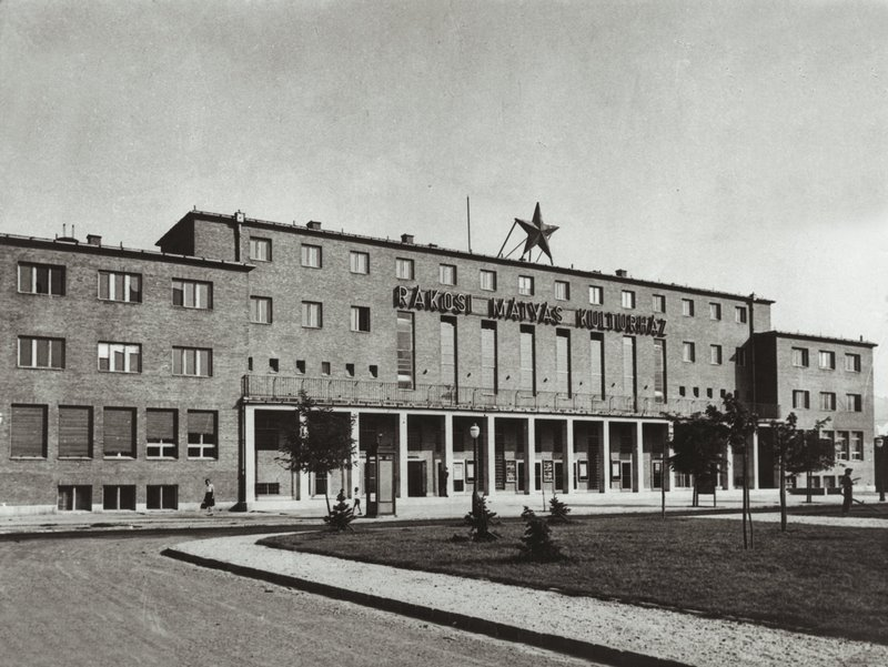 Rákosi Mátyás Kultúrház (1949-1956) (Magyarország, 1131 Budapest, József Attila tér 4.)